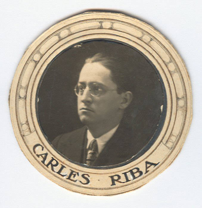 Retrat de Carles Riba, professor de Literatura general i espanyola (1916-1920) i de Literatura general (1920-1923 i 1930-1939)